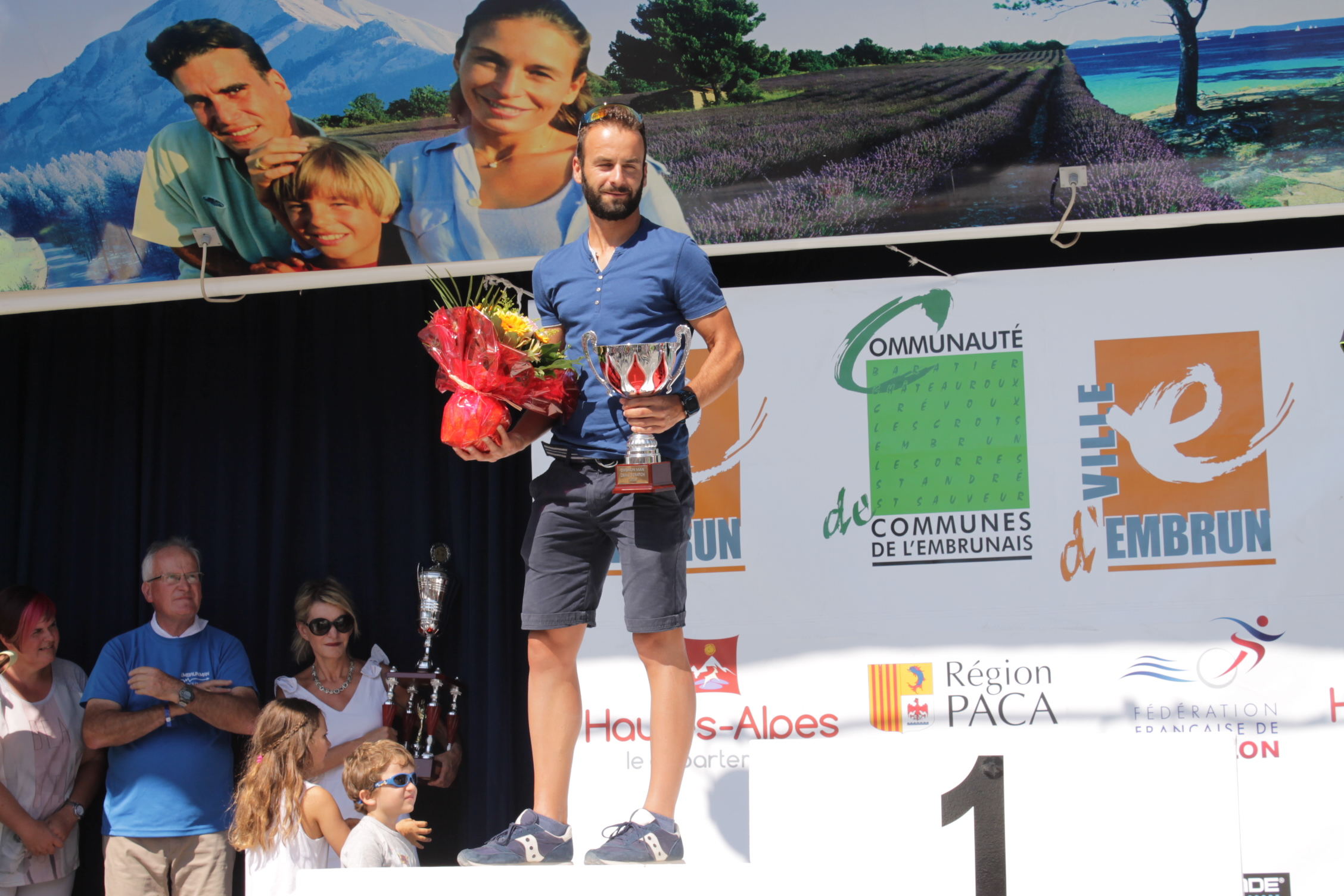 Embrunman 2016